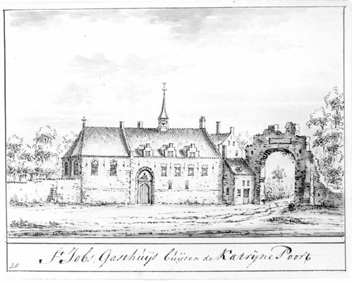 De Doofpoort als buitenpoort, en het St.-Jobsgasthuis aan de westzijde van de stad Utrecht getekend in ca. 1725 naar een onbekende tekening uit ca.1600